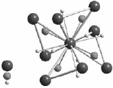 Environnement d'un atome d'yttrium dans Y3Au3Sb4 d'après Dwight